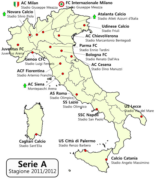 Distribuzione geografica squadre Serie A 2011-2012